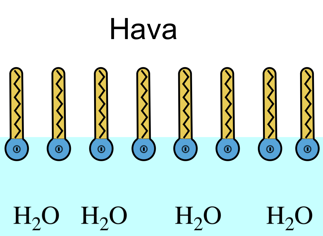 Yüzeyi aktif maddelerin su yüzeyindeki hali.